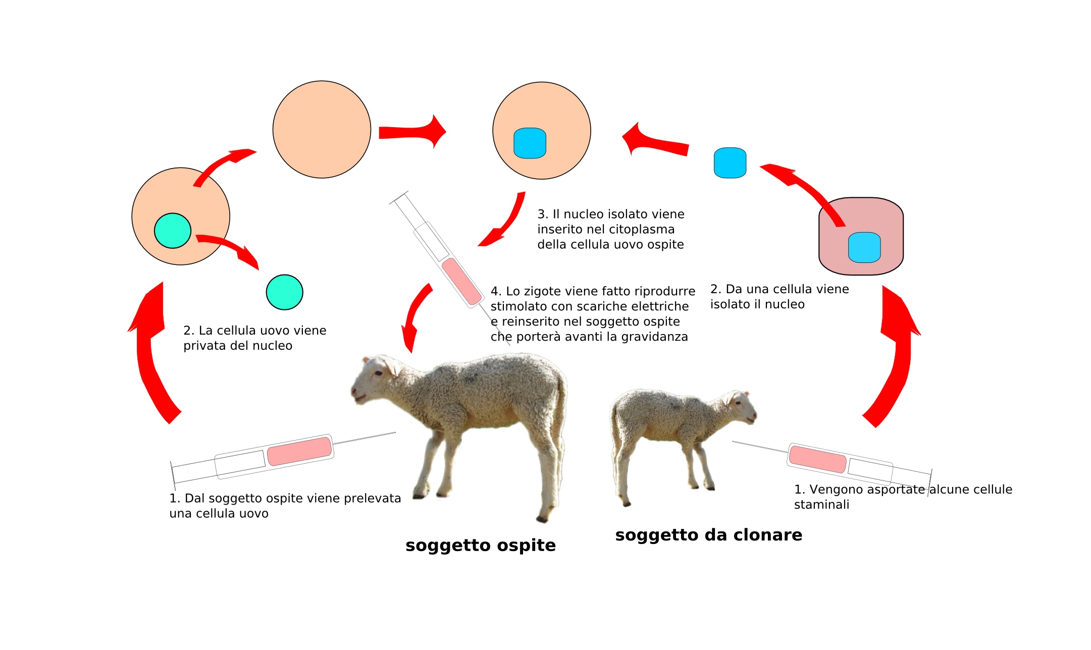 schema della clonazione in italiano (PNG)